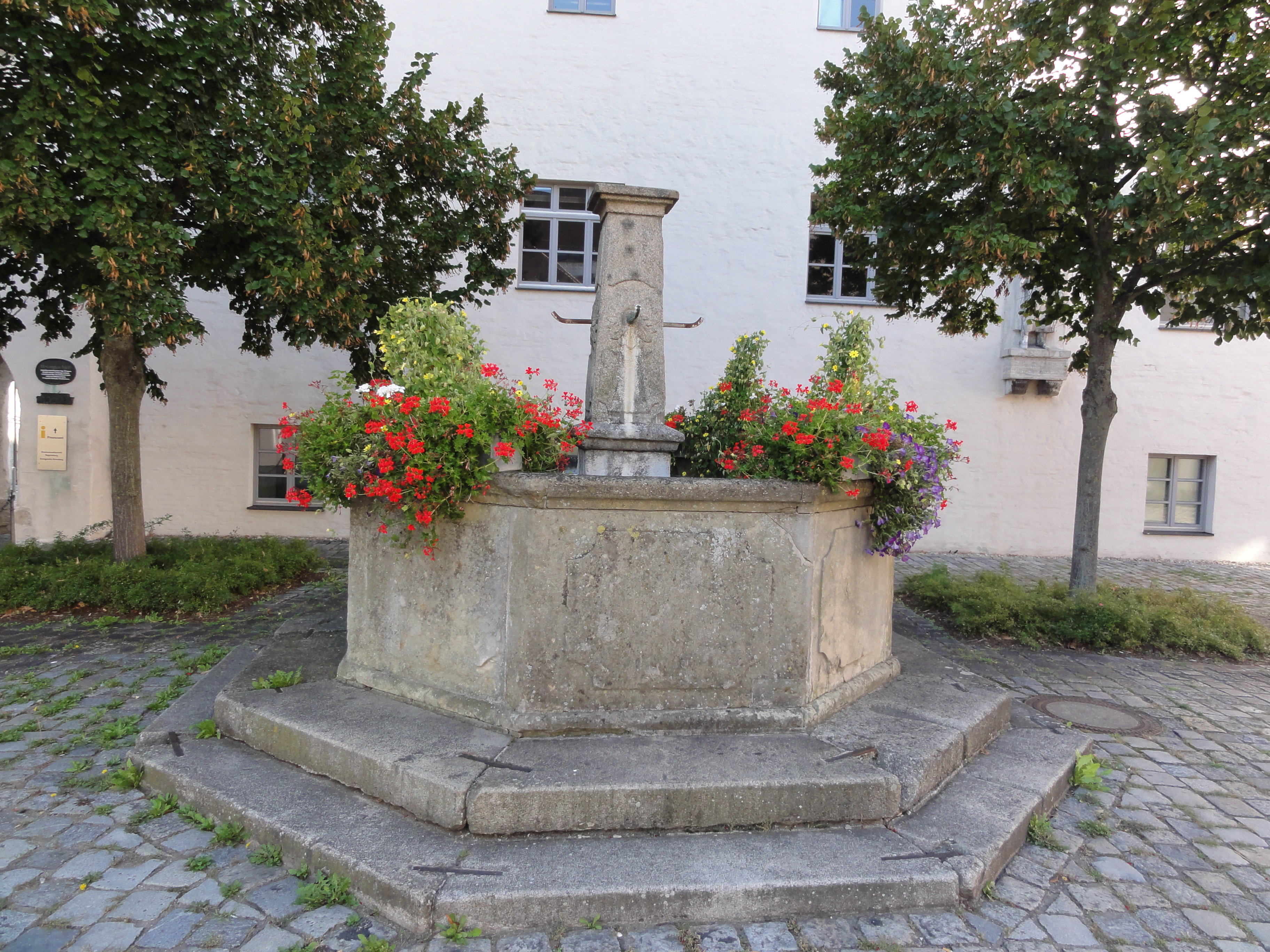 Straubing - Brunnen (Herzogschloss) Info GPS data may be inaccurate. EXIF data regarding date and time may be inaccurate.